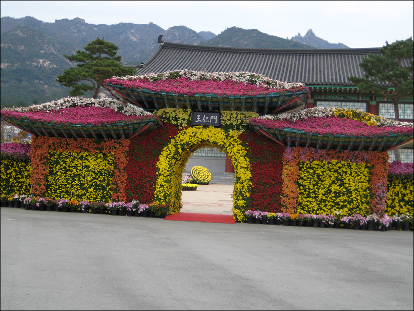 (Photos: Anyongdang, Gurim village)